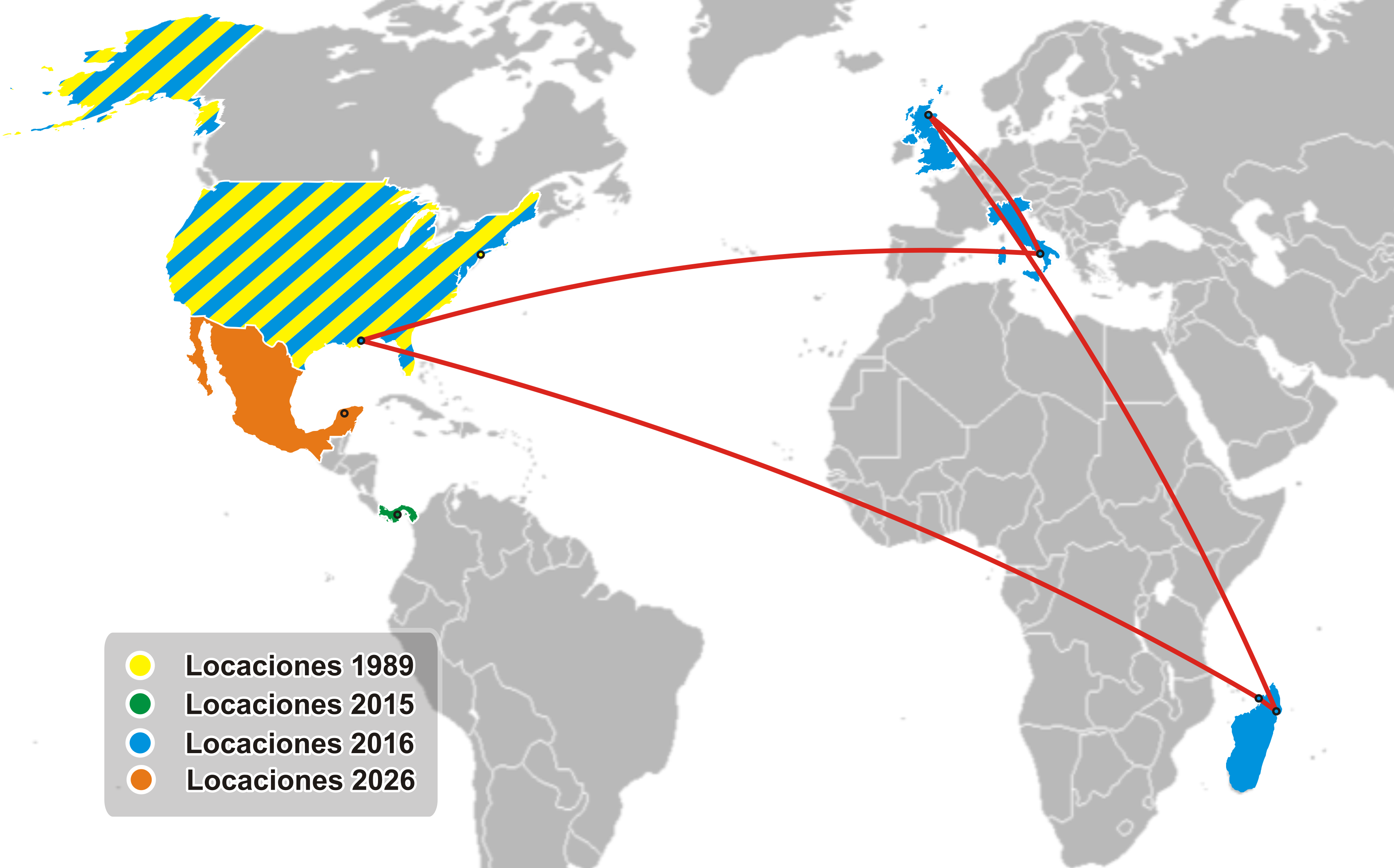 Uncharted 4: El desenlace del ladrón